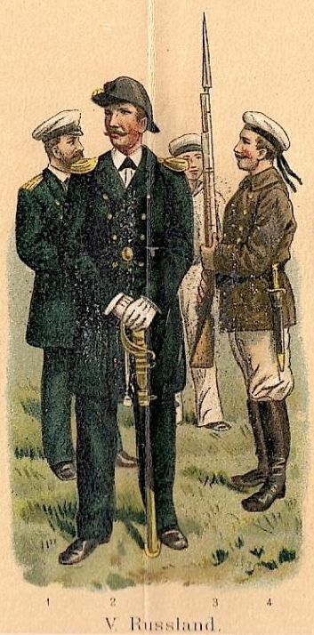 Uniformen der "Marine-, Schutz- und Kolonialtruppen" europäischer Staaten Ende des 19. Jahrhunderts, Beilage zum Artikel "Marine" (1) und (2) Seeoffiziere in kleiner und großer Uniform (3) Matrose (Sommeranzug) (4) Soldat der Marinegarde